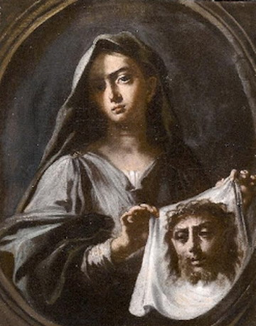 S.Veronica by Giuseppe Bonito 1745.jpg